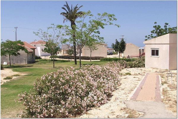 פאת שדה התמונות באדיבות קטיף.נט (קישור) אתר האינטרנט של גוש קטיף. צילם: מוטי סנדר.